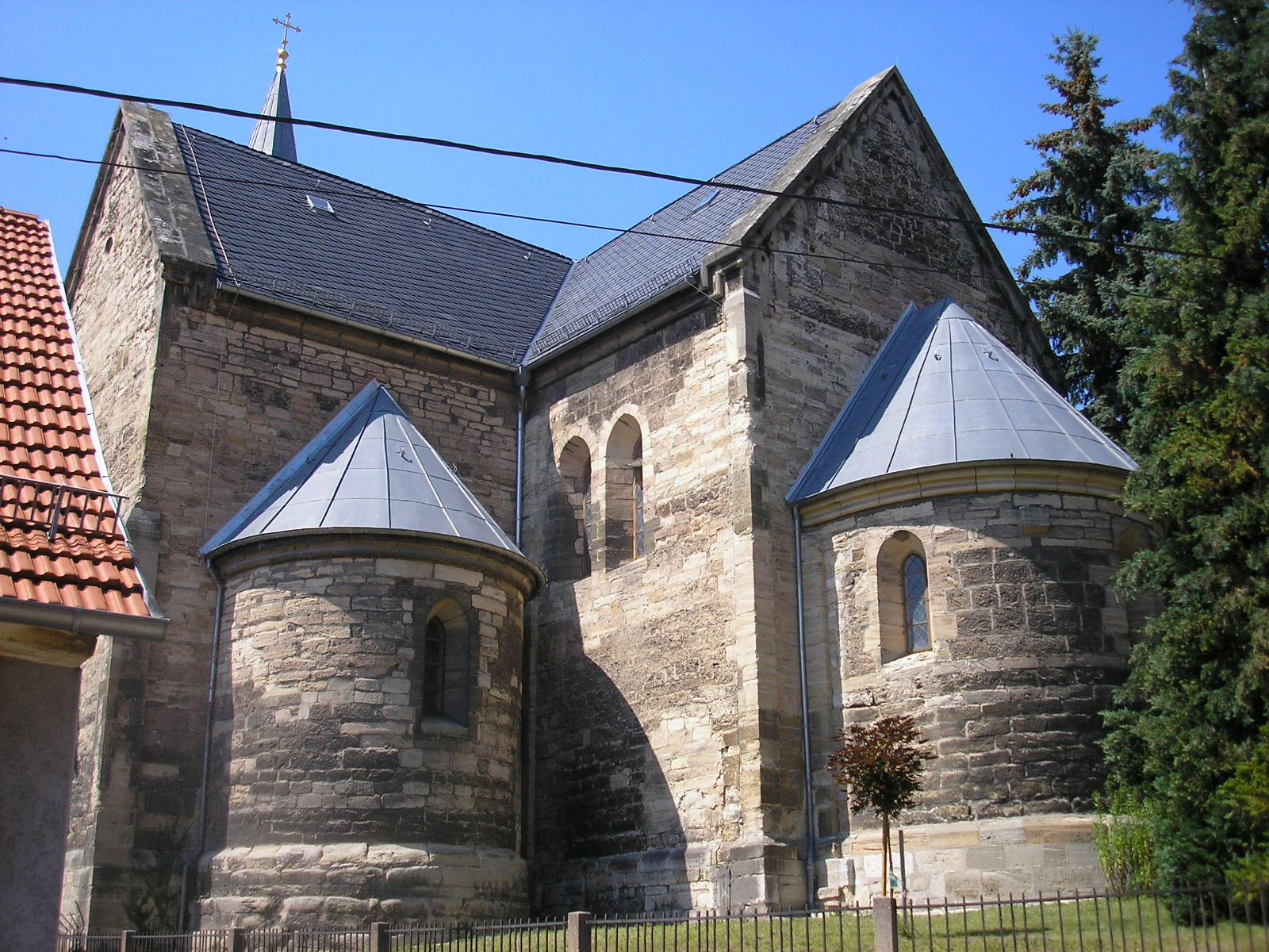 Apsis der Stadtkirche in Treffurt (Thüringen).